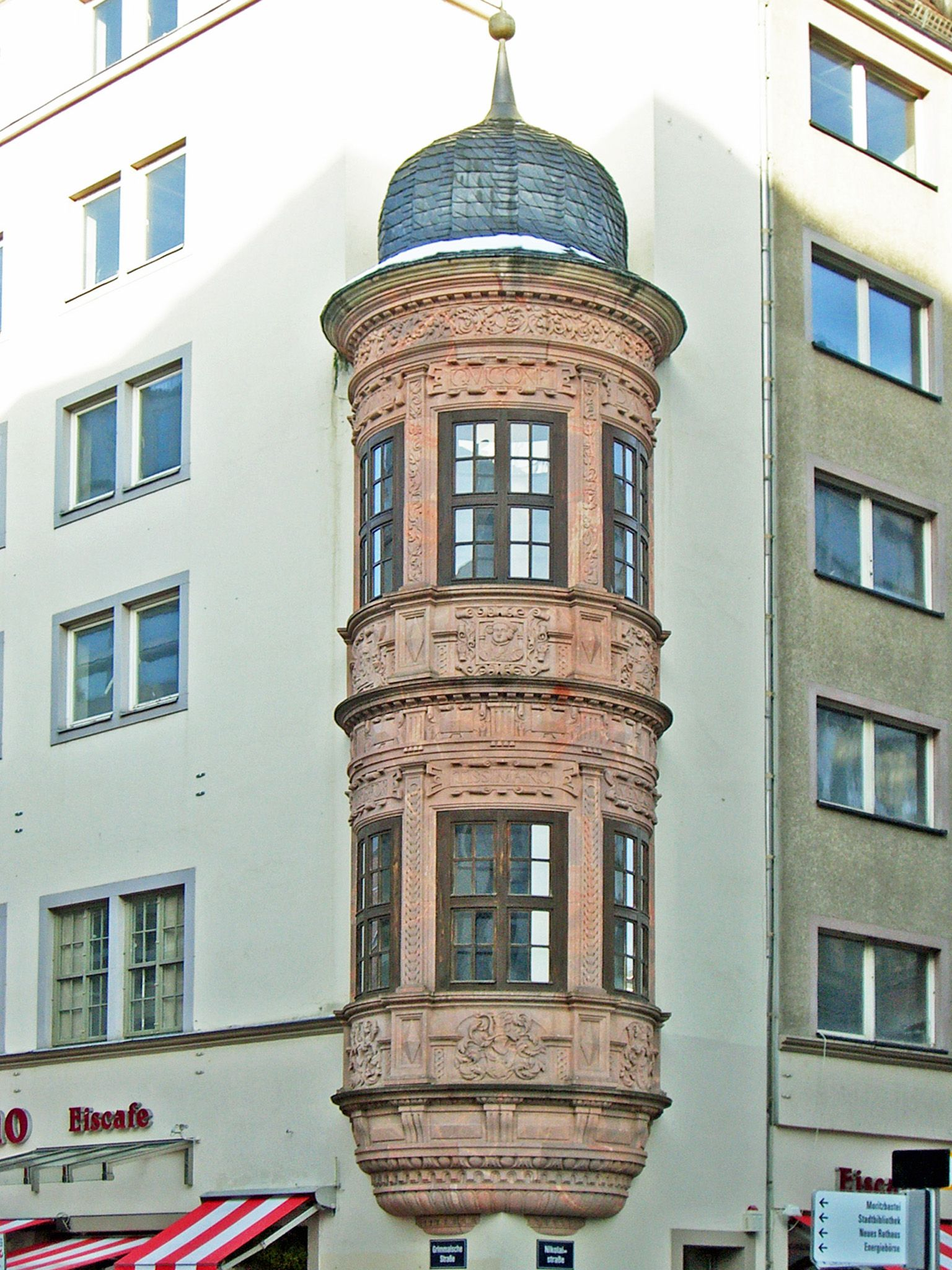 Der Fürstenerker in Leipzig. Kopie eines Erkers vom ehemaligen Fürstenhaus.